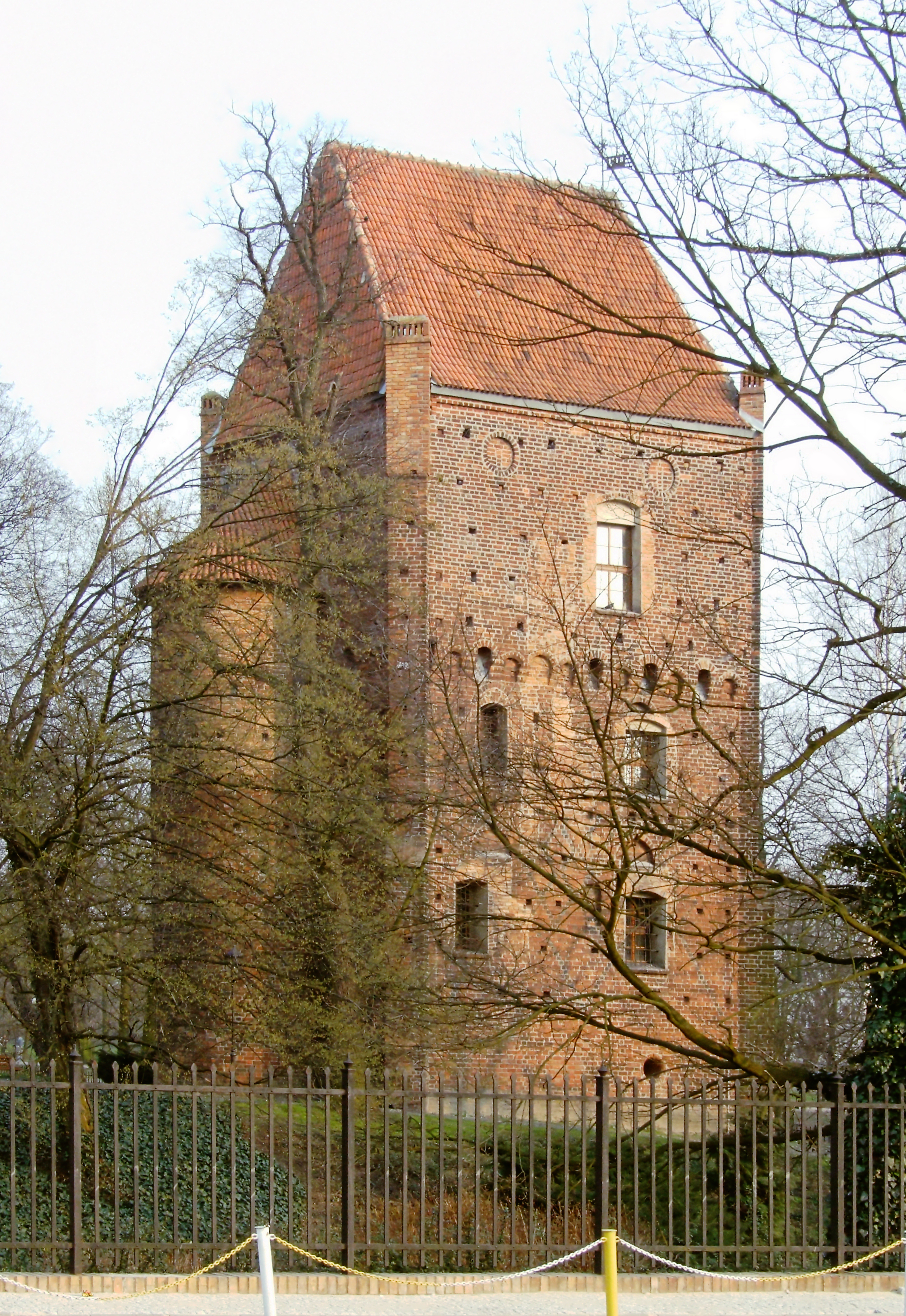 Szamotuły; baszta Halszki w zespole zamku Górków